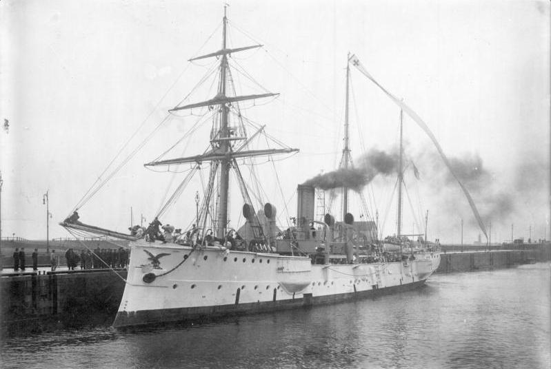 Kleiner Kreuzer "Sperber" Sperber, Kleiner Kreuzer. Stapell[auf].: 23.8.1888 [Kleiner Kreuzer SMS Sperber]